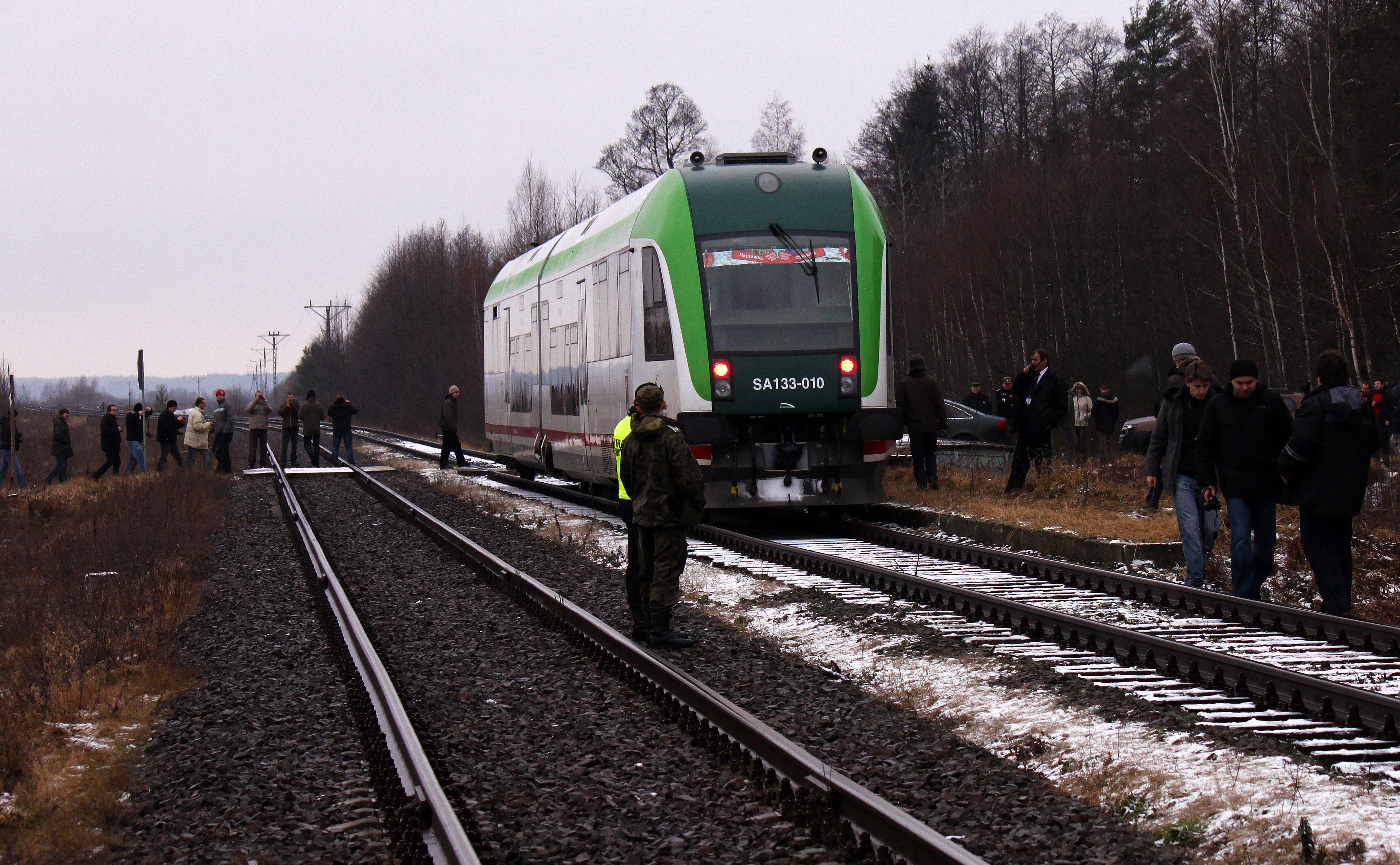 Nieczynny przystanek Cisówka.